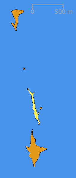 Ostrůvek Vahekari v rámci souostroví Malusid.